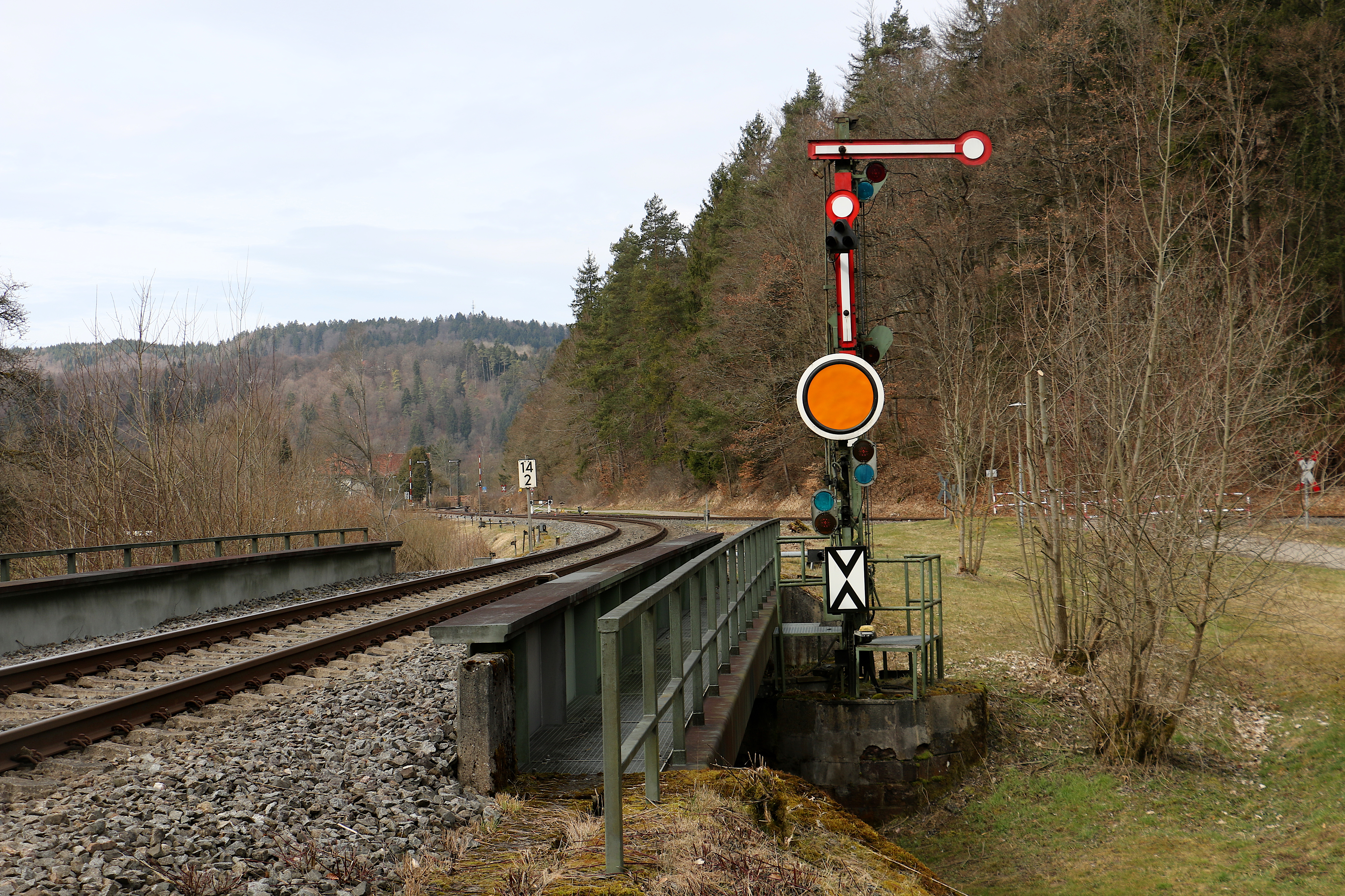 Mechanisches Einfahrsignal Fridingen (2018)